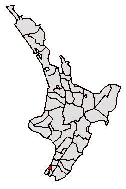 Die Karte zeigt die Lage des Porirua City Council (Neuseeland) rot